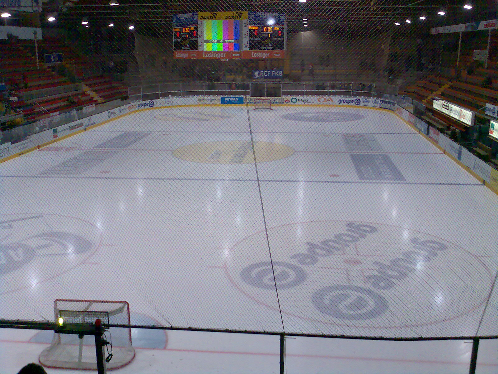 Patinoire de Saint-Léonard à Fribourg